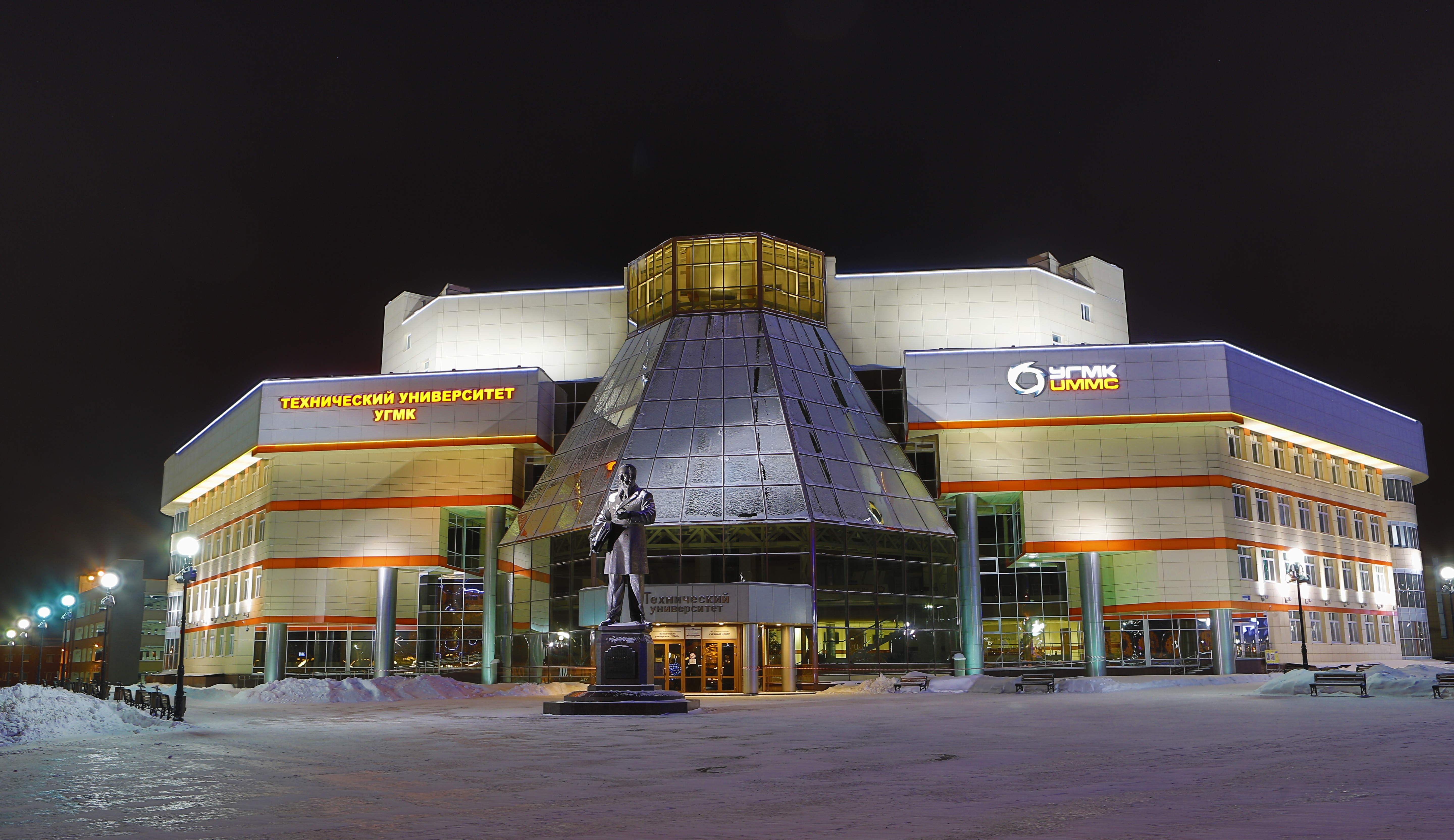 Верхняя Пышма. Вечер. Технический университет УГМК.